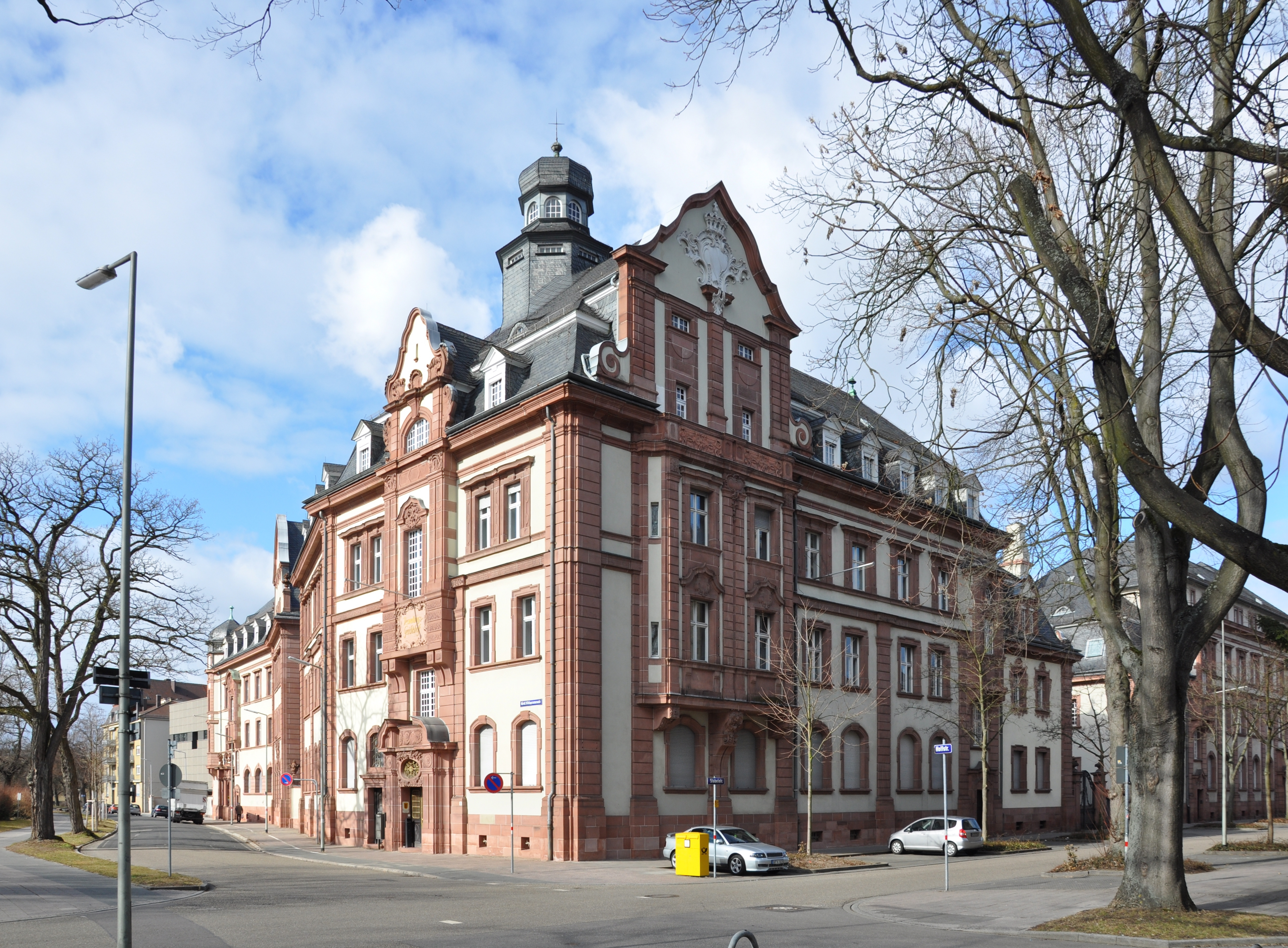 Verwaltungsgericht Karlsruhe in der Karlsruher Weststadt